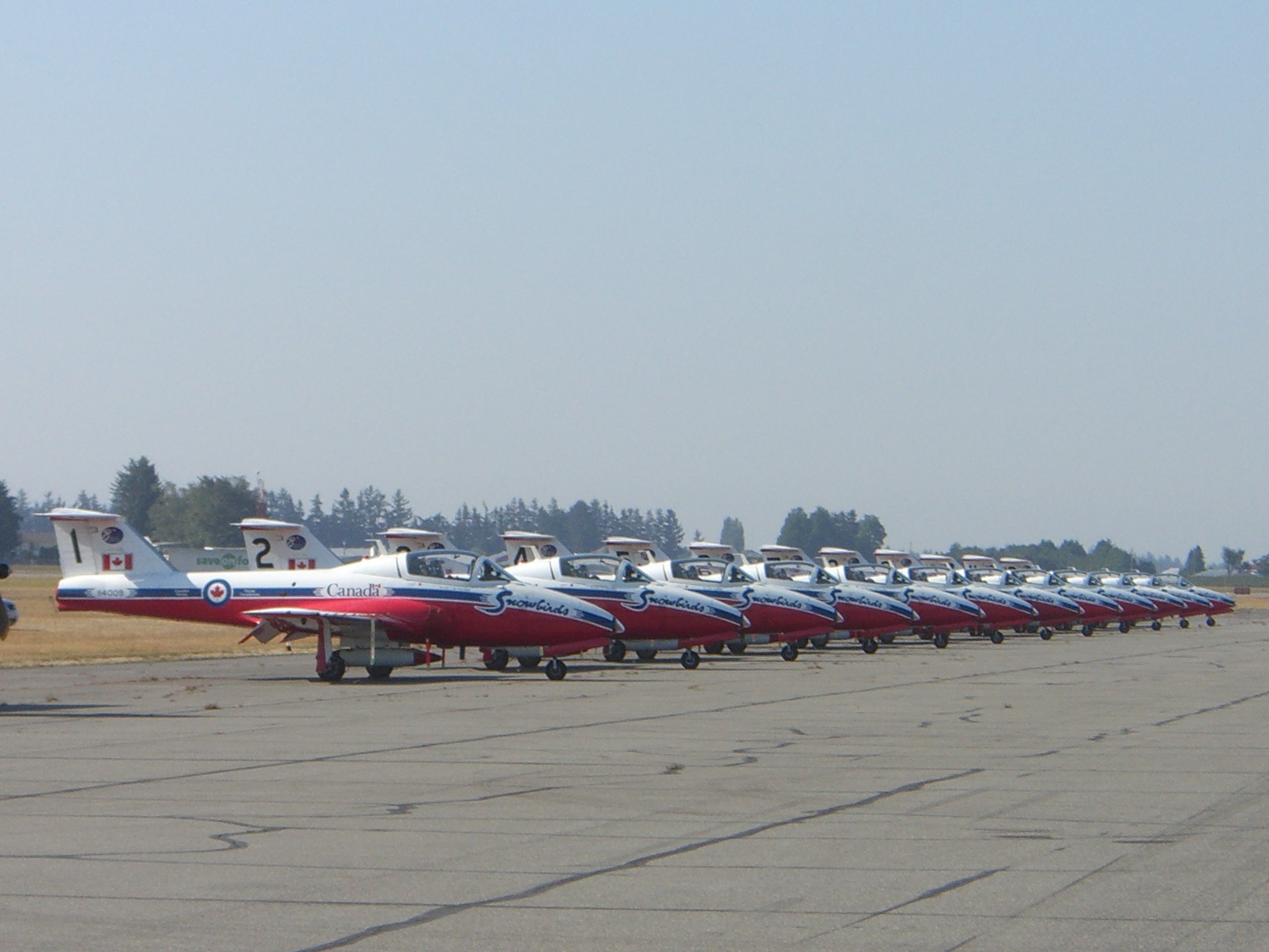 Los Snowbirds canadienses preparados para participar. Picture of Canadian Snowbirds by me.